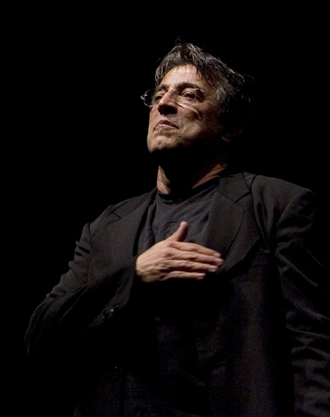 Ivan Lins. 8 Novembro 2007, Pavilhão Atlântico em Lisboa